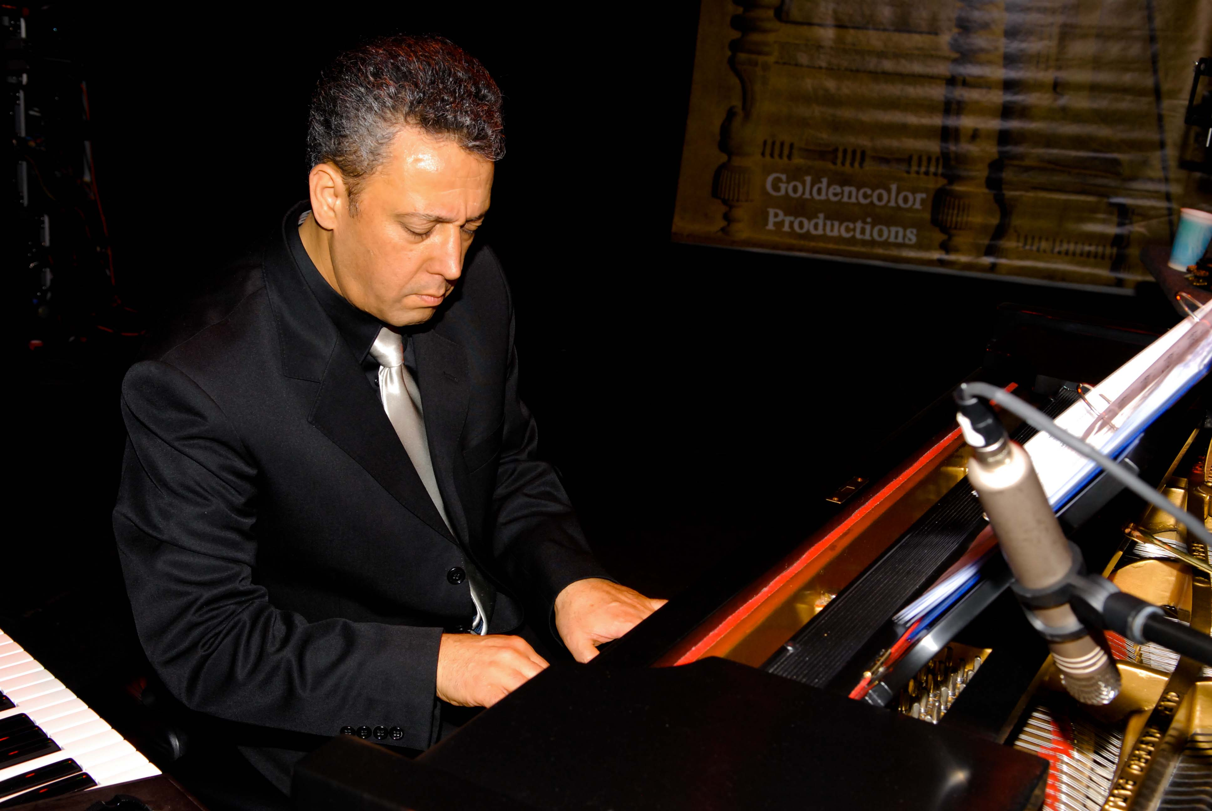 کاظم عالمی